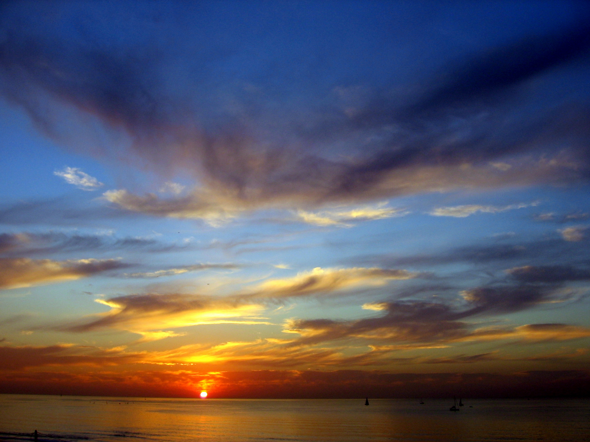 Sunet, from Zebulun beach in Herzliya, Israel